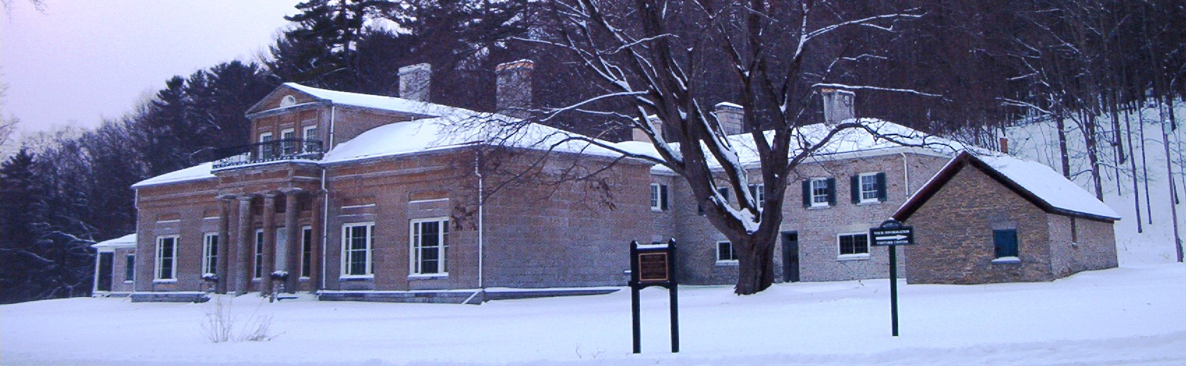 Hyde Hall